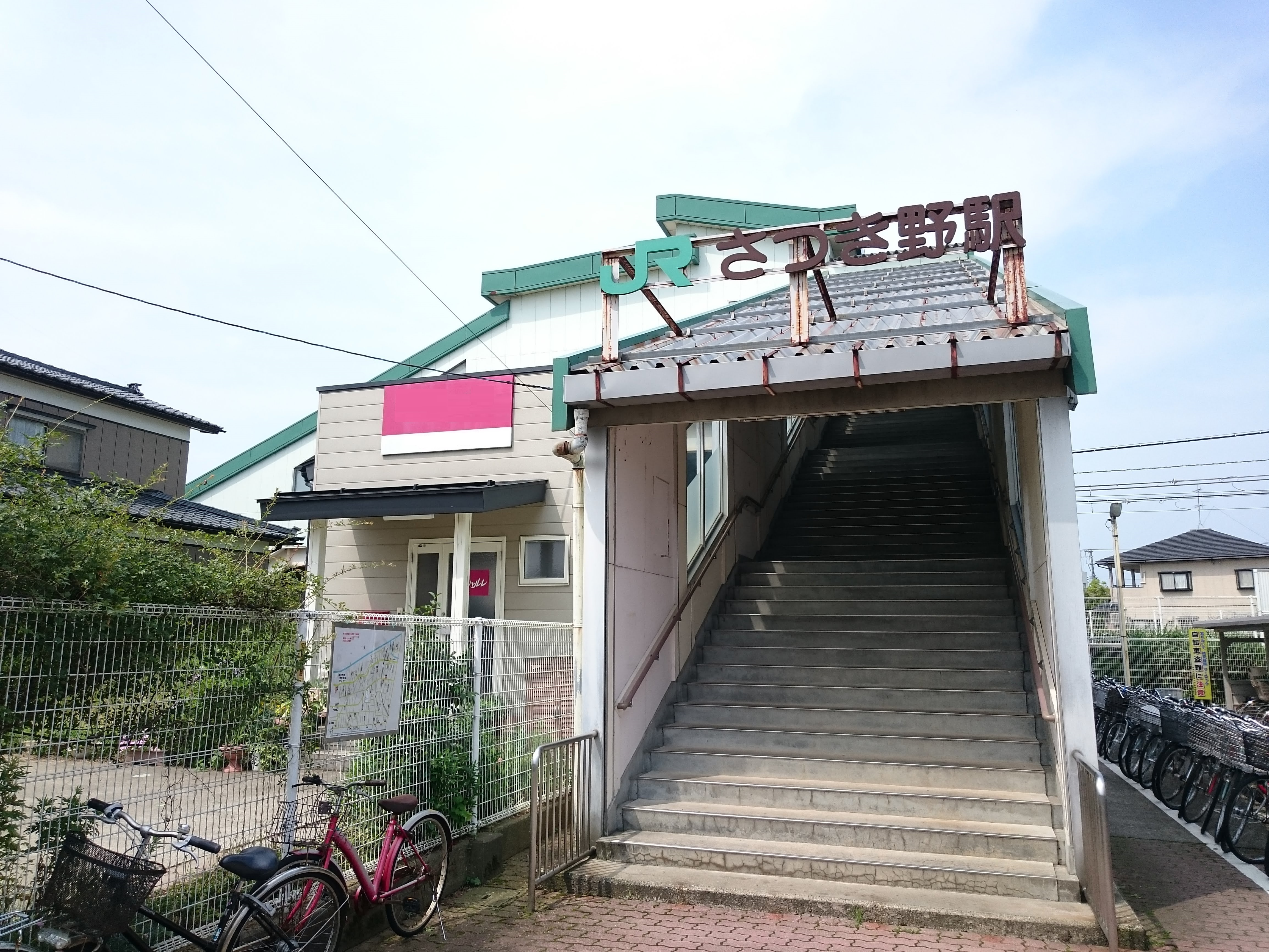 さつき野駅の東口